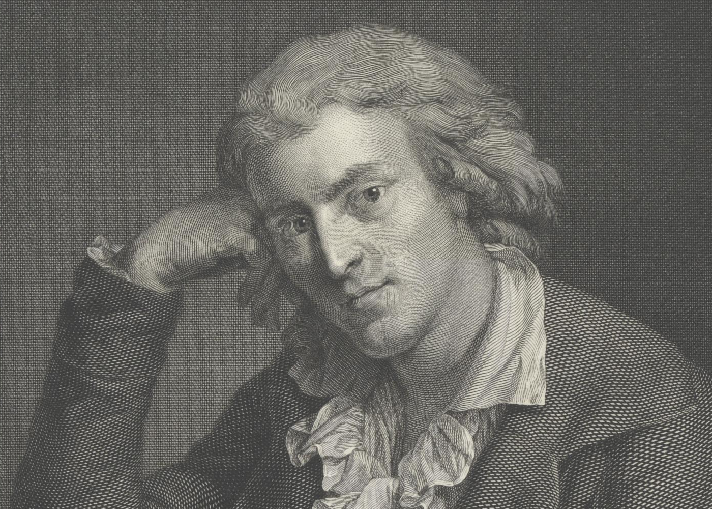 Porträt Friedrich Schillers nach Johann Graff, gestochen von Johann Gotthard Müller, Detail. Verleger: Johann Friedrich Frauenholz, Verleger, Verlagsort: Nürnberg, 1773/1822, Kupferstich; Radierung, 560 x 408 mm (Blatt); 474 x 324 mm (Platte). Coburg, Kunstsammlungen der Veste Coburg, Inventar-Nr. III,341,100, Mappe 2, Passepartout 18, nach einem Gemälde von Anton Graff